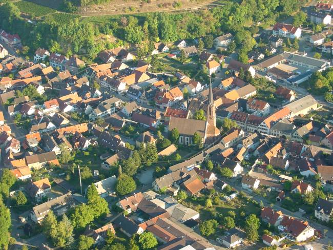 Luftbild von Eichstetten aufgenommen bei einer Ballonfahrt.